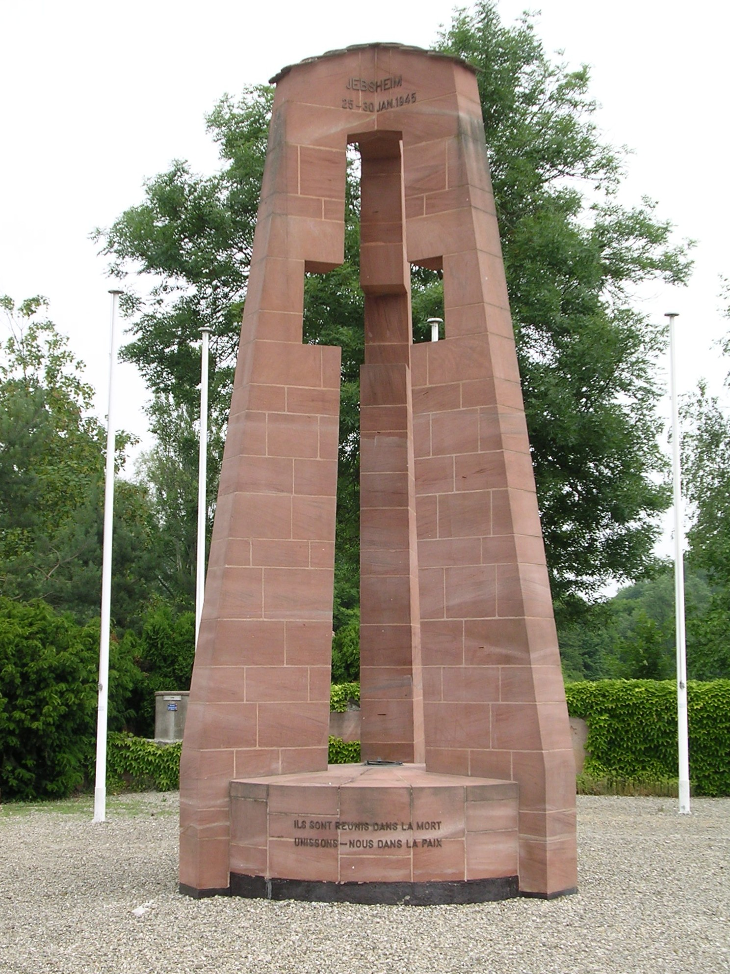 Monument in de Vredestuin bij Jebsheim, Elzas, Frankrijk